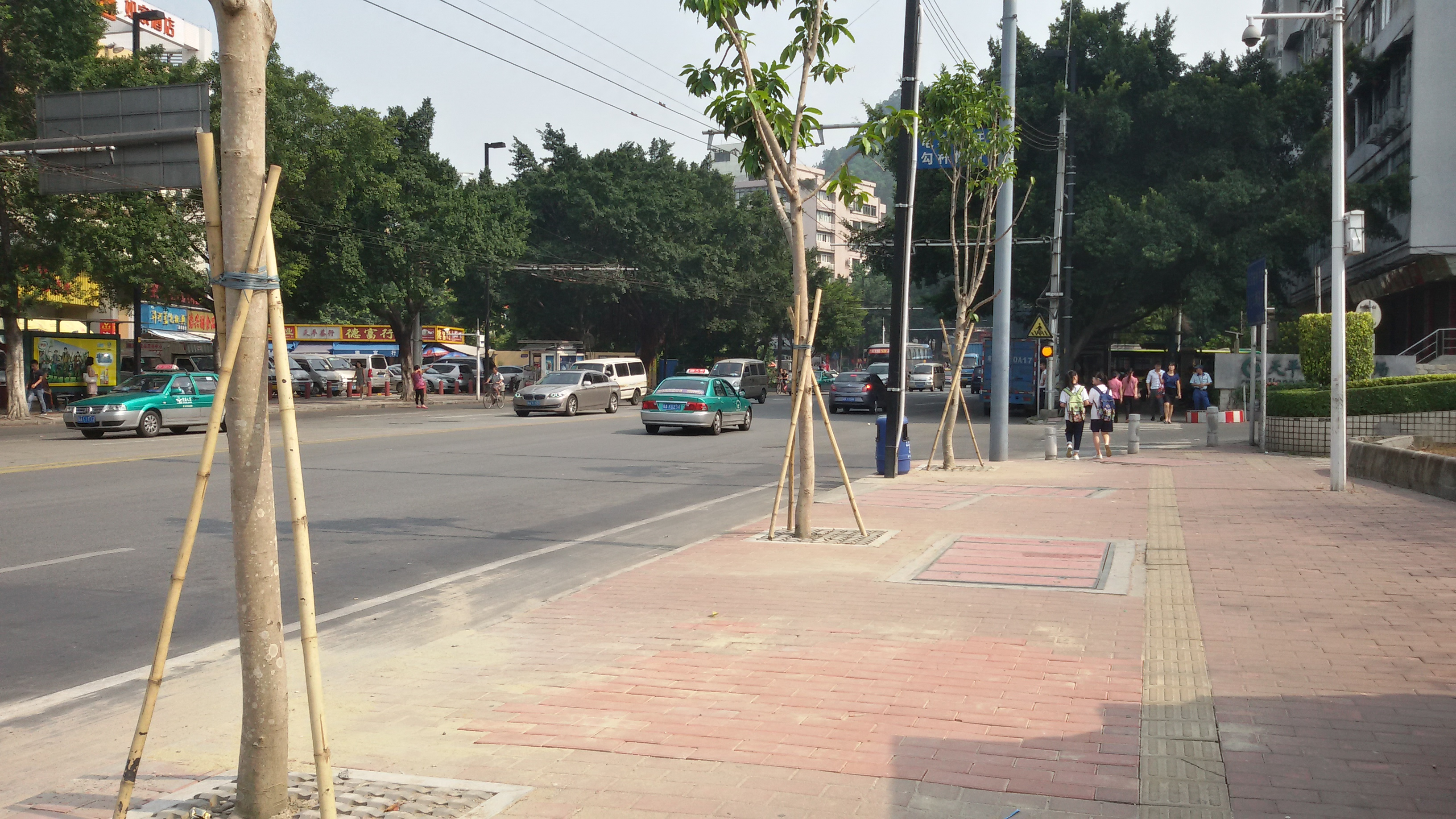 粵語: 興華路嘅一部分